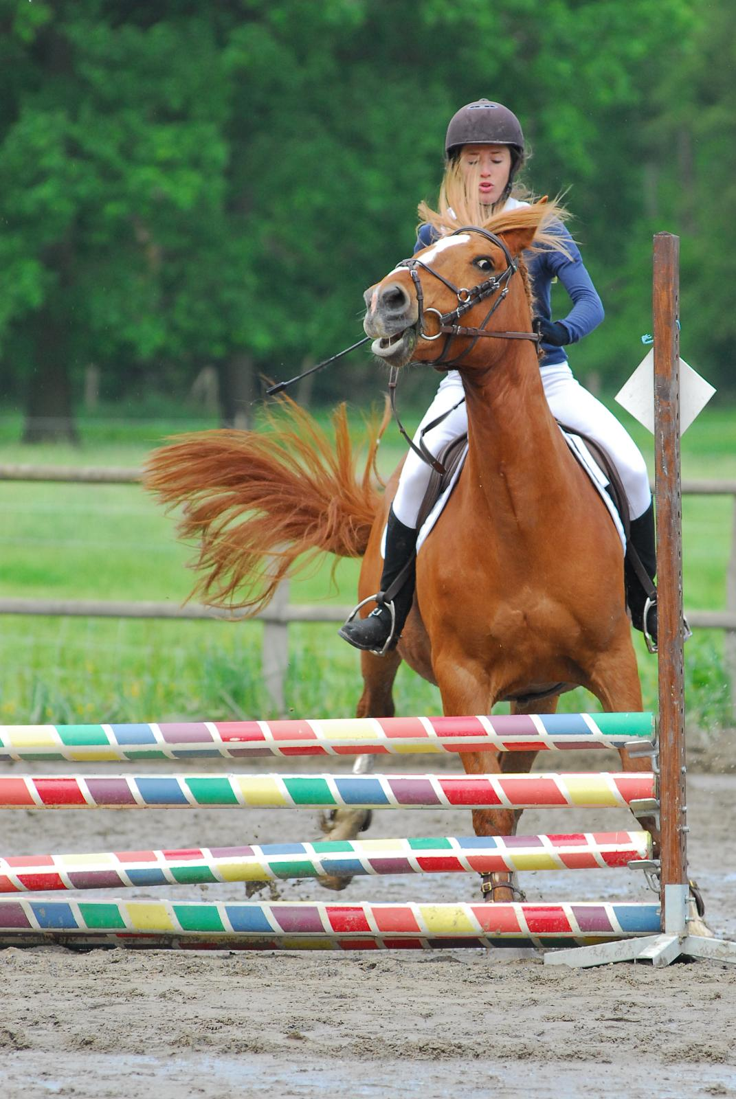 Refus sur le tour d'obstacle sur un concours complet